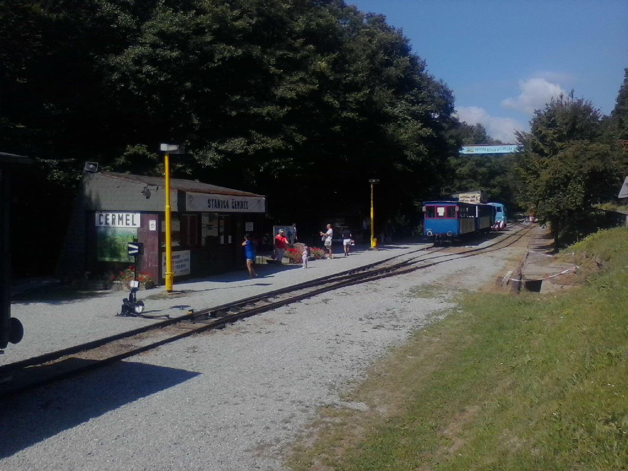 Pohľad na stanicu Čermeľ z hlavnej cesty Košice - Košická Belá.